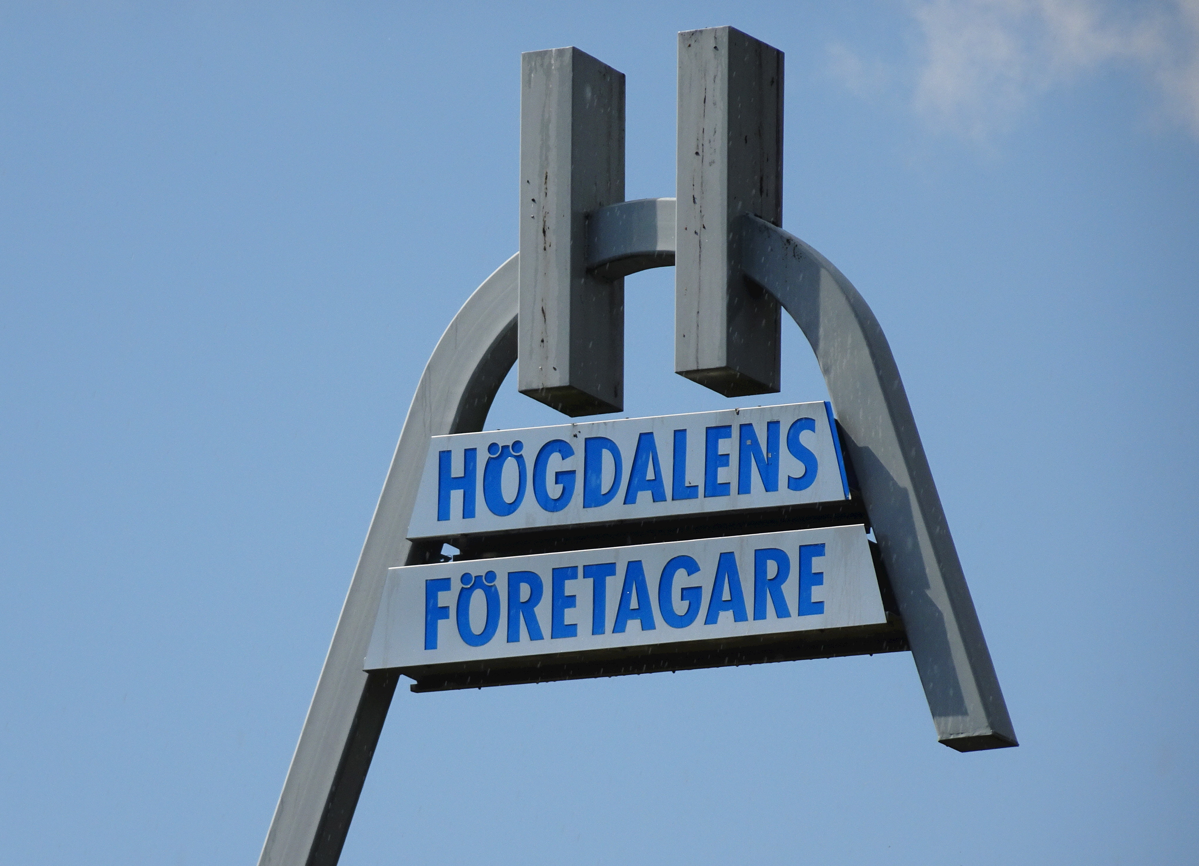 Högdalens Företagare